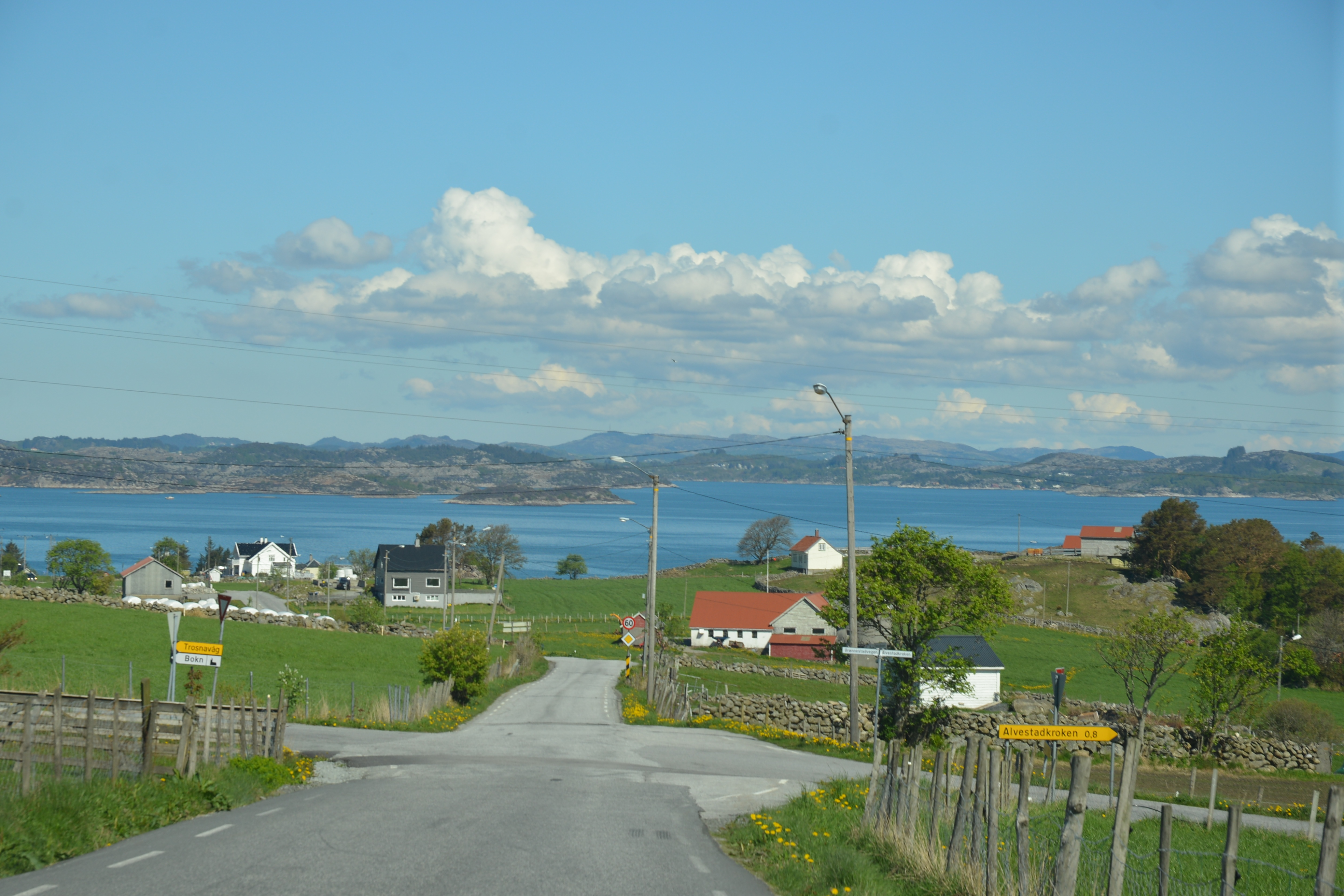 Mot Føresvik